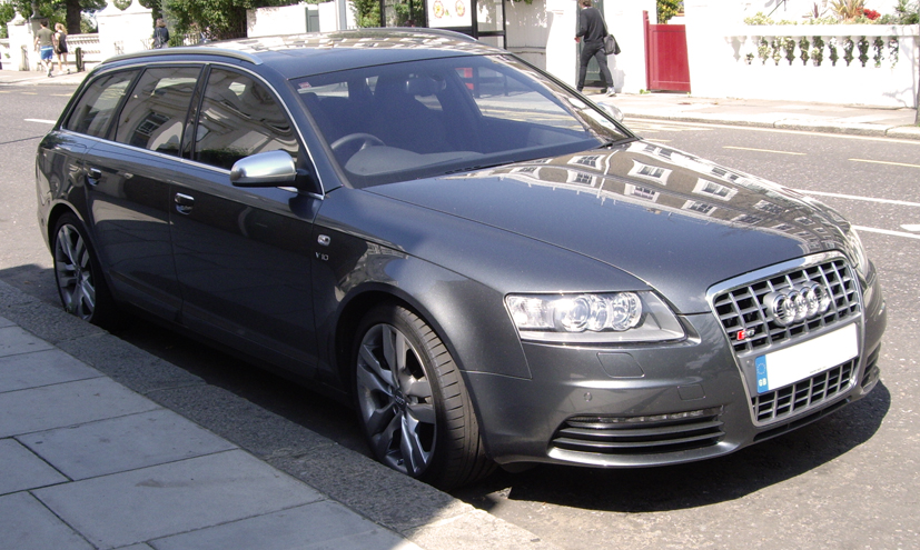 Audi S6 Avant